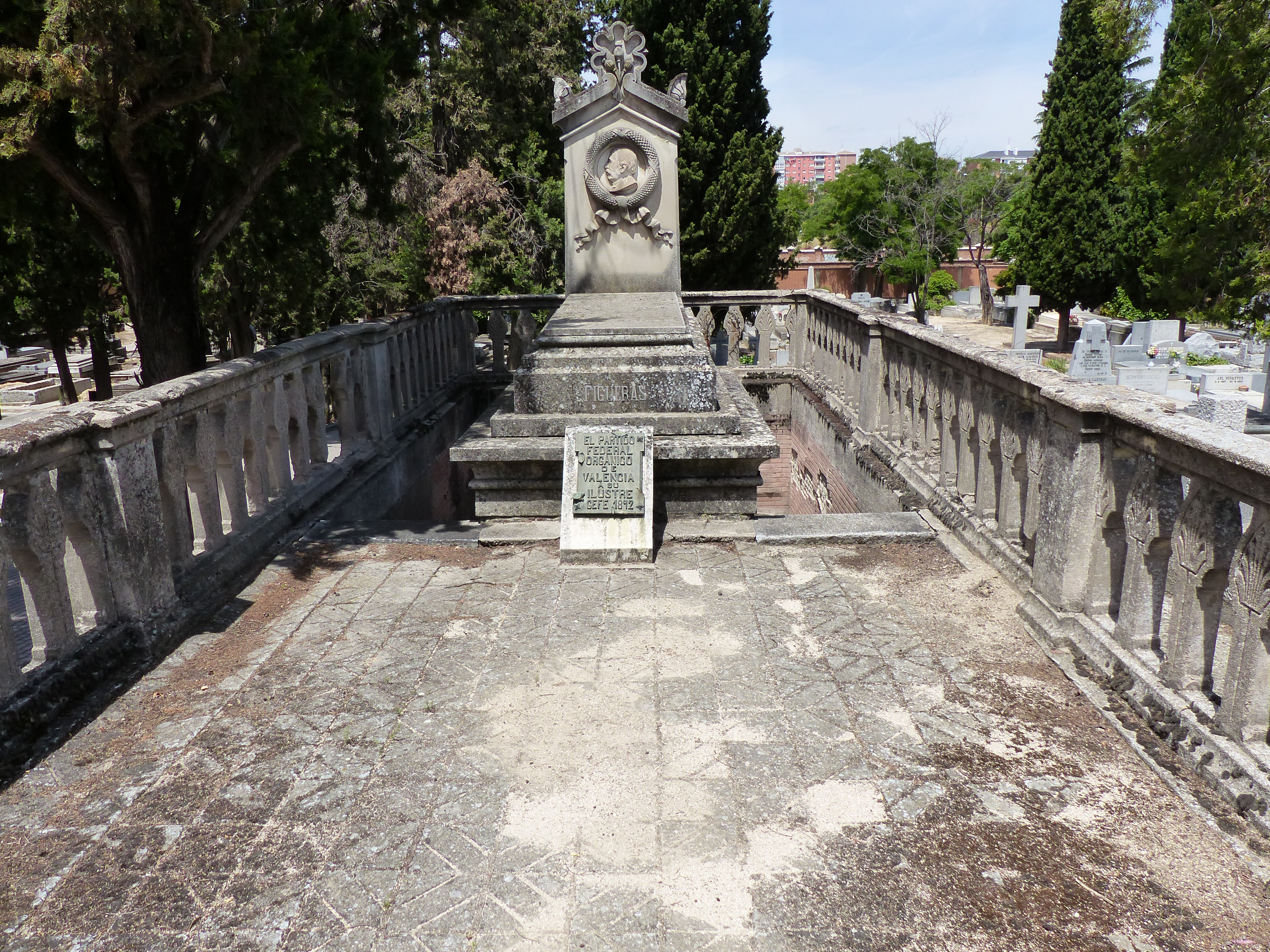 Tumba de Figueras